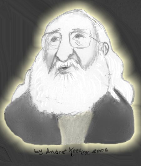 Caricatura do Educador brasileiro Paulo Freire Desenho feito por André Koehne a pedido de MHV do UK.